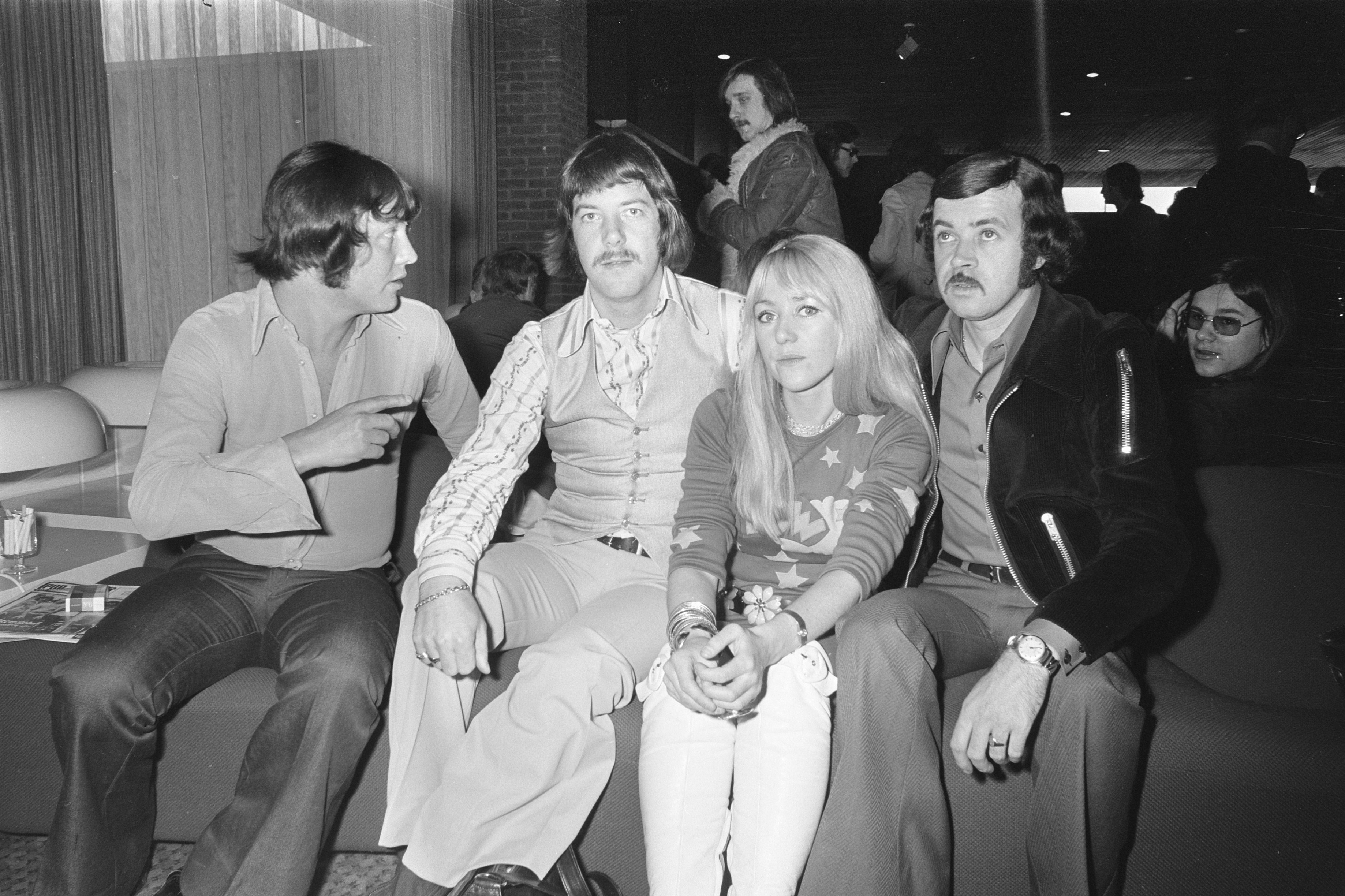 Collectie / Archief : Fotocollectie Anefo Reportage / Serie : [ onbekend ] Beschrijving : Persinstuif Grand Gala, Middle of the Road Datum : 25 februari 1972 Fotograaf : Verhoeff, Bert / Anefo Auteursrechthebbende : Nationaal Archief Materiaalsoort : Negatief (zwart/wit) Nummer archiefinventaris : bekijk toegang 2.24.01.05 Bestanddeelnummer : 925-4103